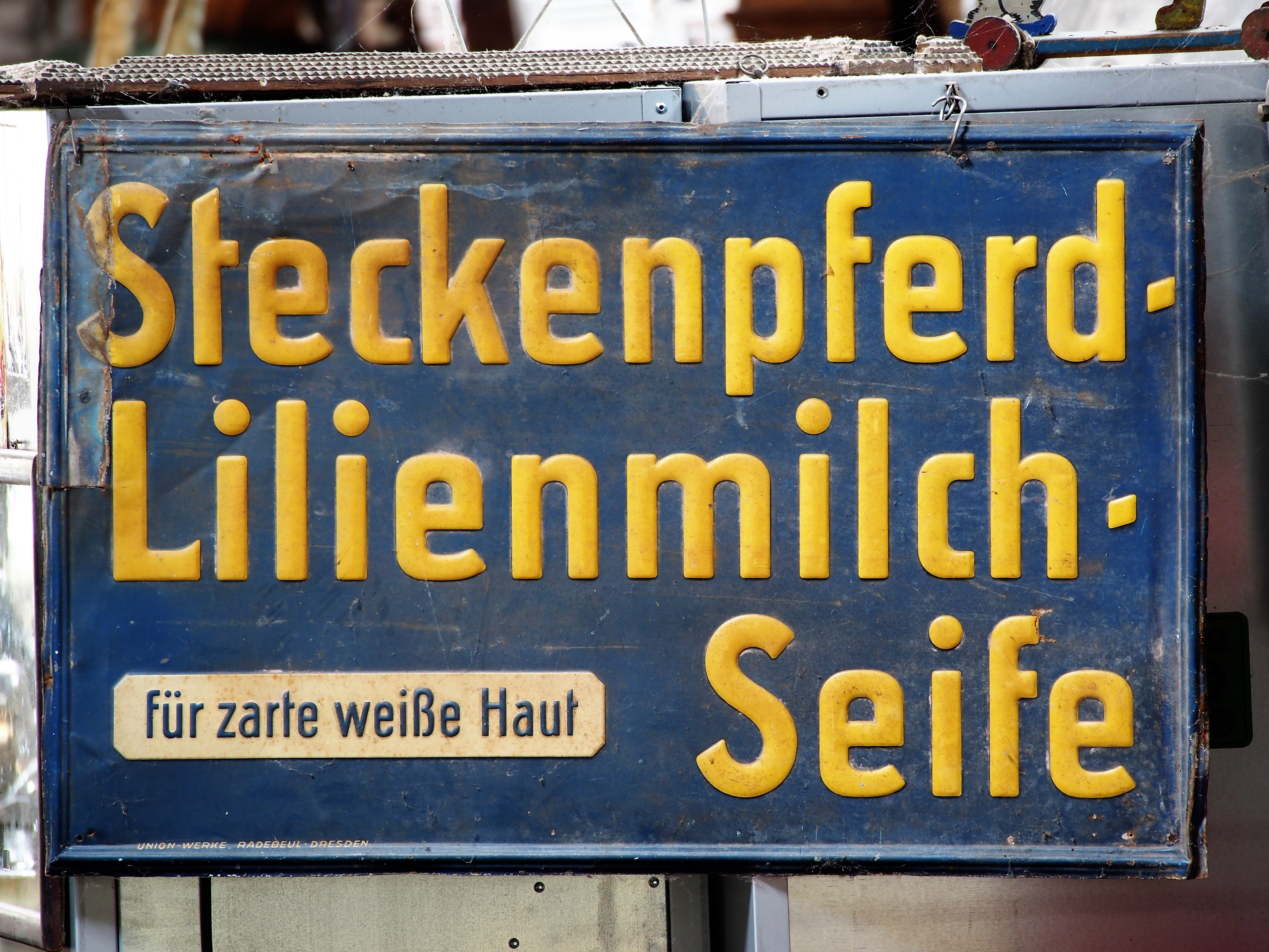 Werbeschild, Fahrzeugmuseum Marxzell.